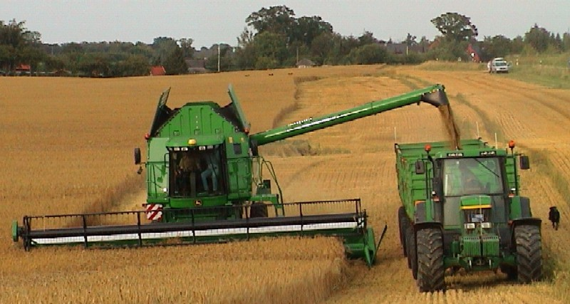 Mähdrescher John Deere 9880 STS beim Abtanken während der Fahrt in der Gerstenernte.